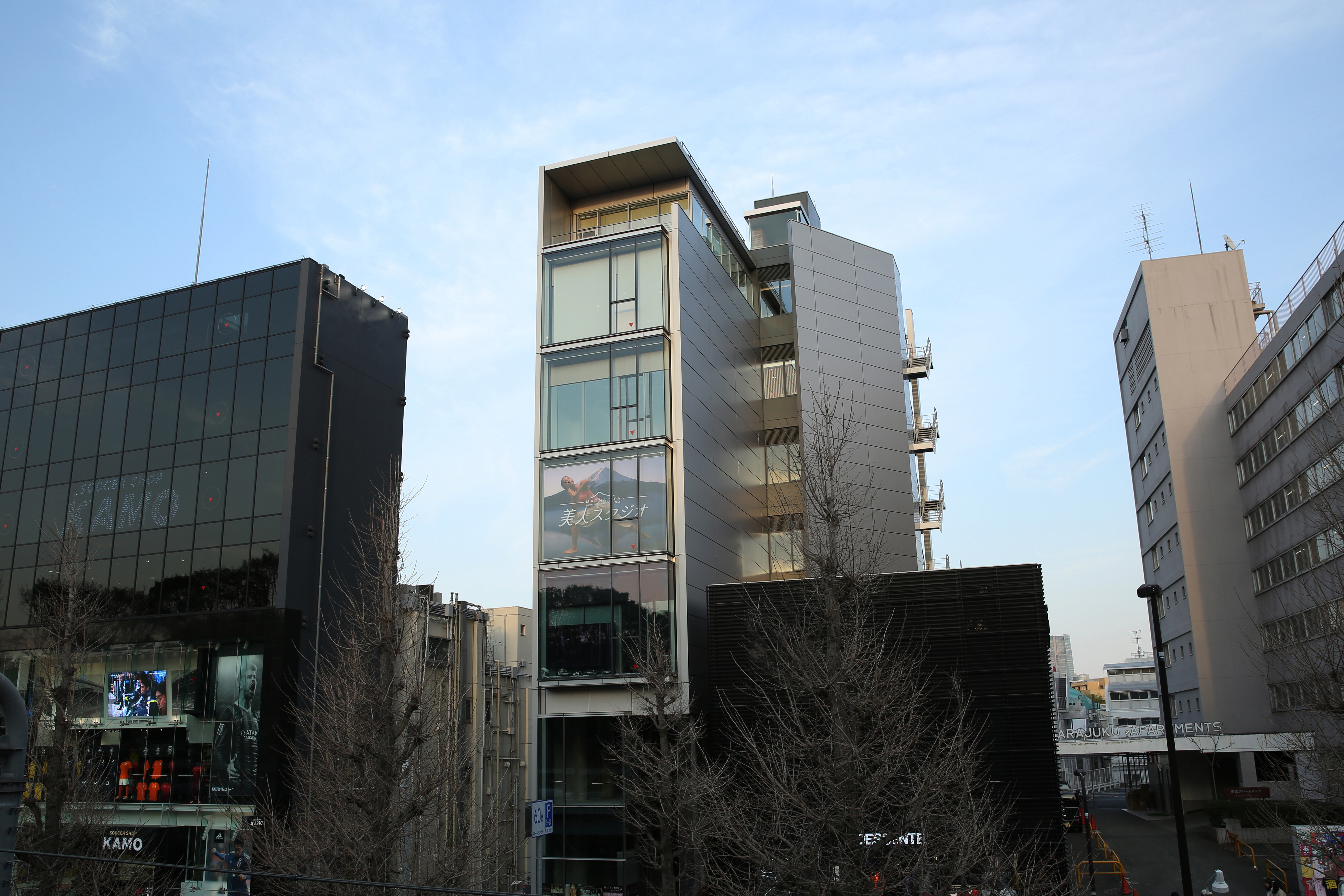 Courtesy of Blum and Poe